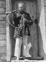 Карел-пастух. Повенецкий уезд, Олонецкая губерния. 1901 год